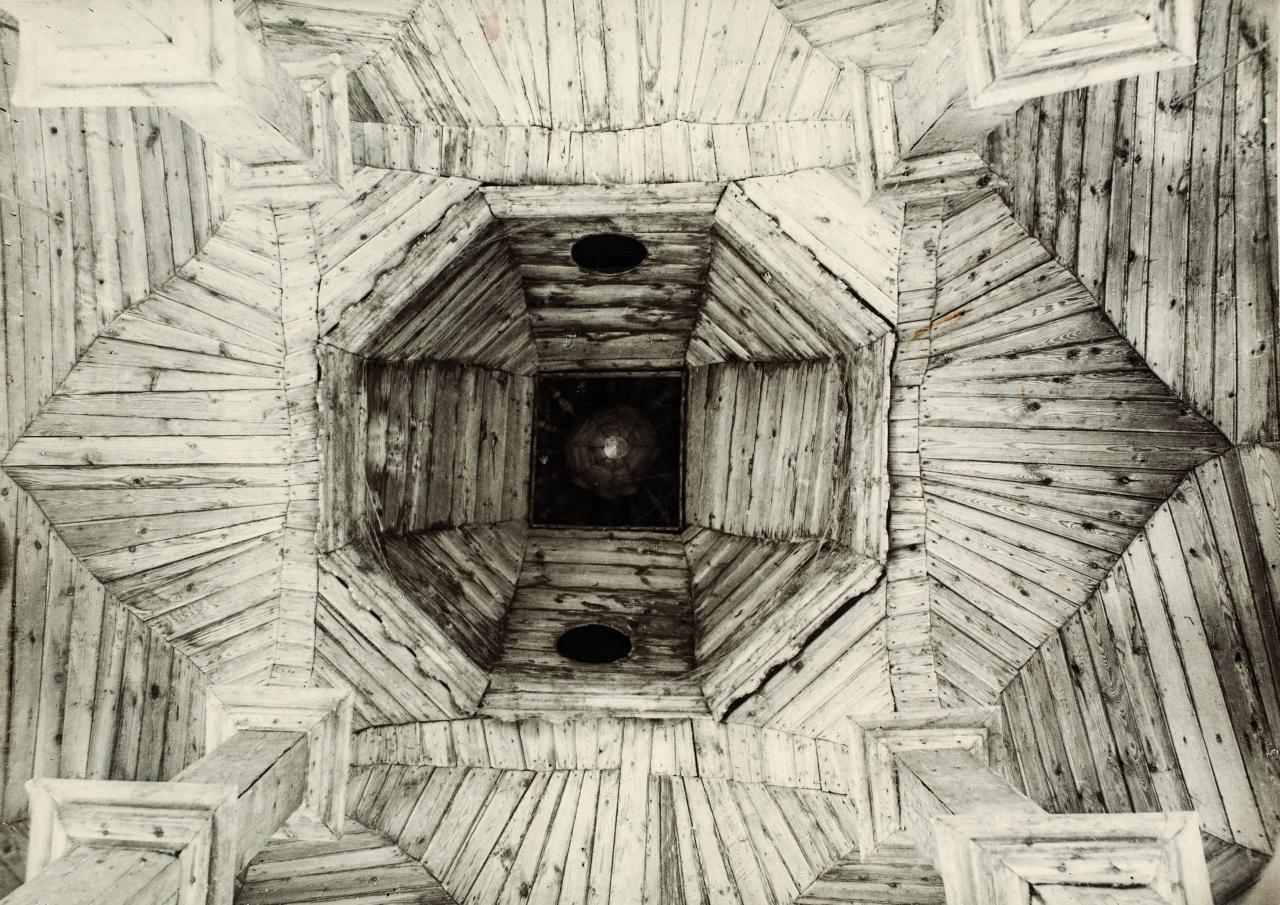 Беларуская (тарашкевіца): Воўпа (Voŭpa). Сынагога